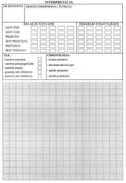 Karta dokumentacji jednostki stratygraficznej - strona 2